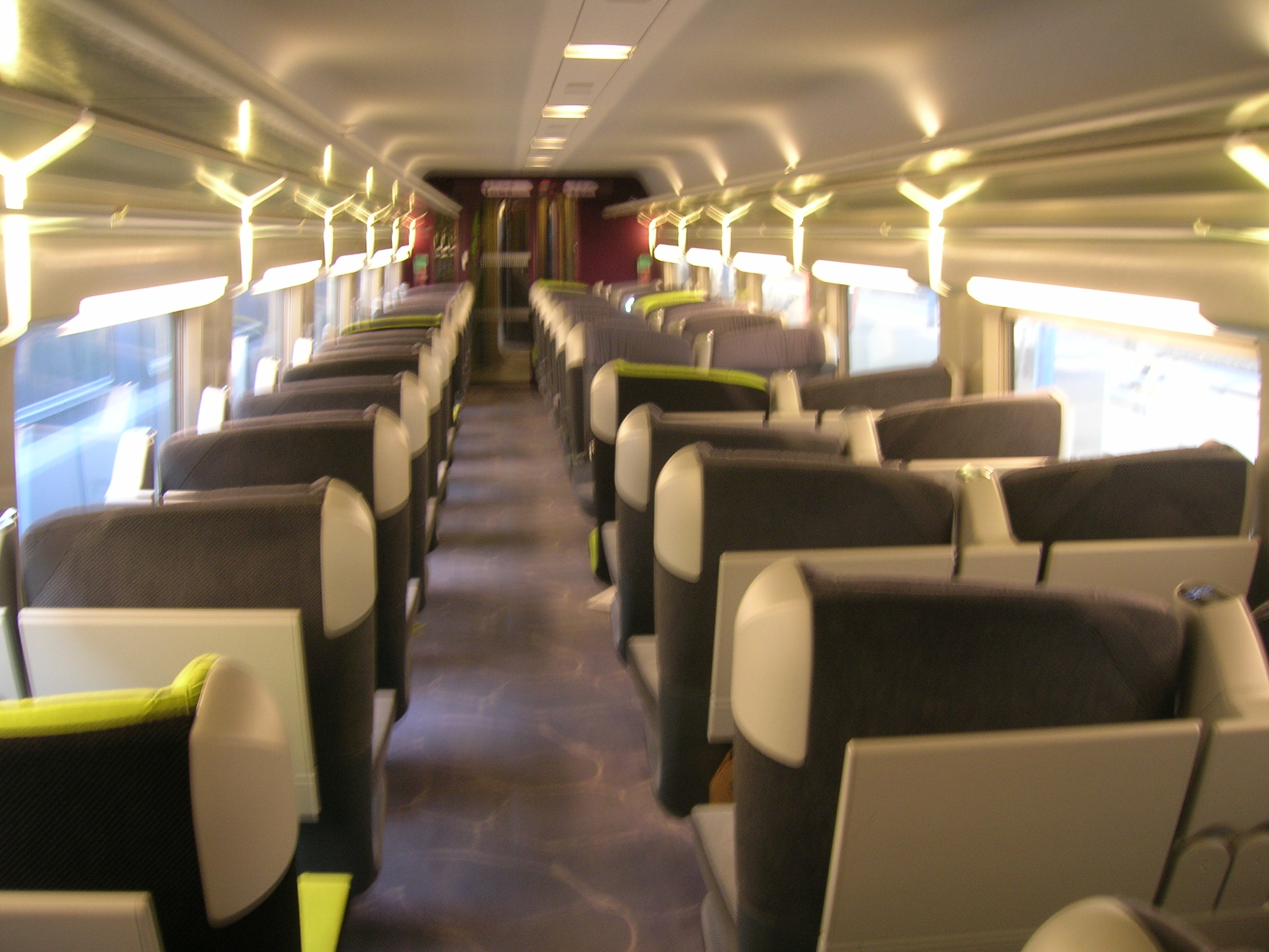 Intérieur 1ère classe de TGV Lacroix